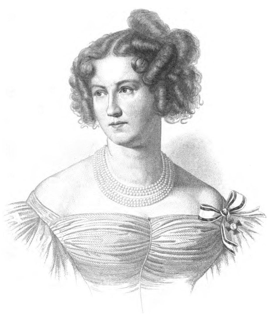 Marianne von Preußen, geborene Maria Anna von Hessen-Homburg